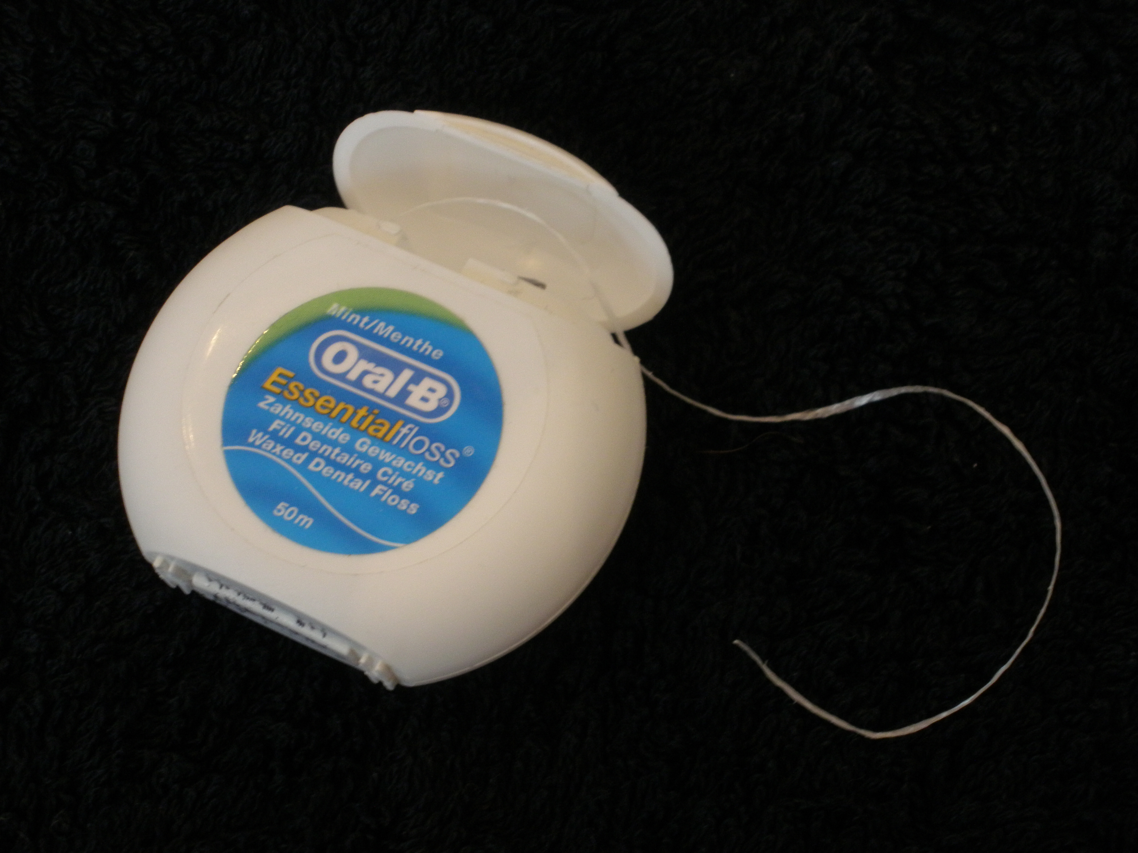 Flosdraad van het merk Oral-B.